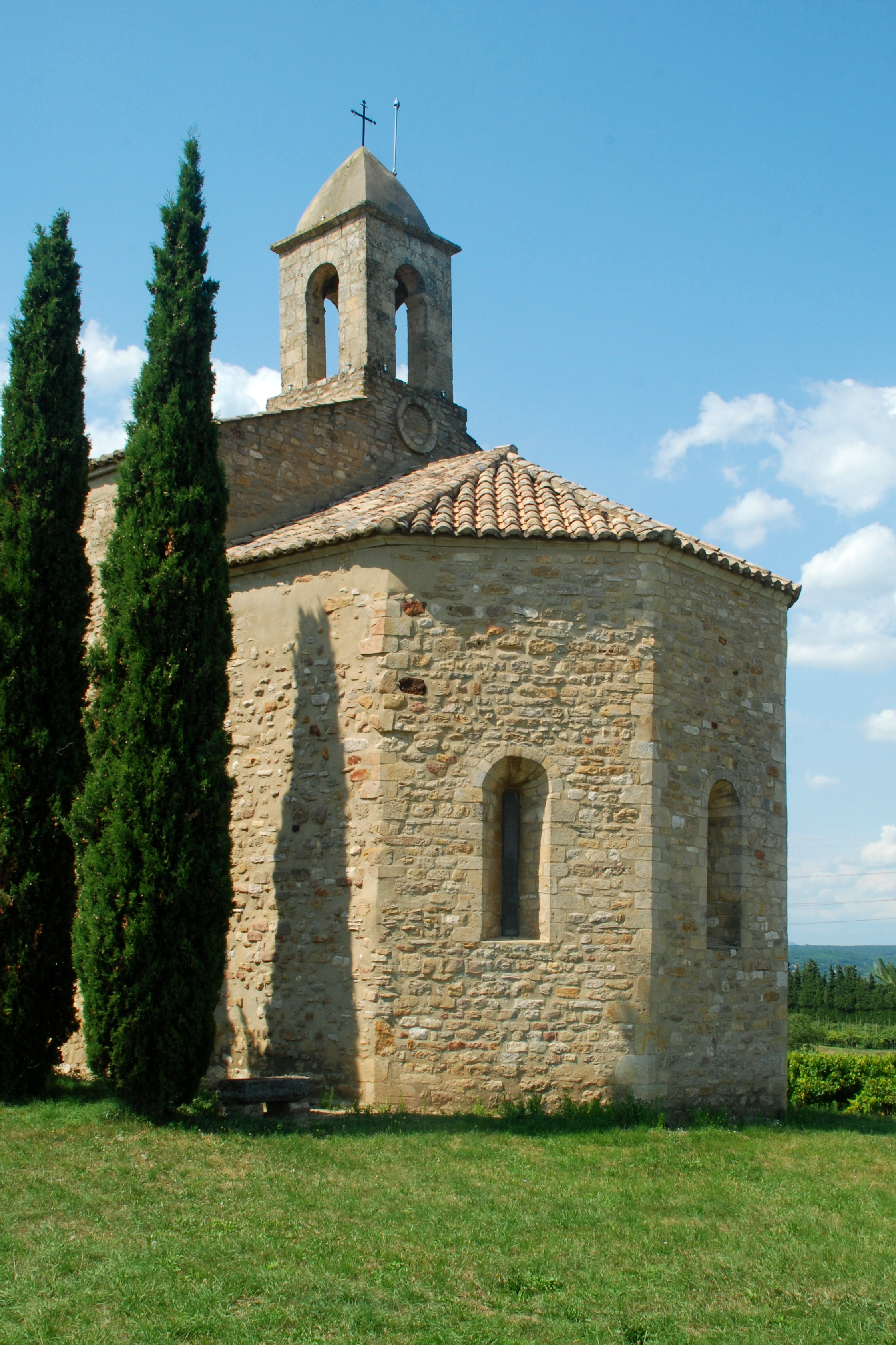 France - Languedoc - Gard - Saint-Paulet-de-Caisson - Chapelle Sainte-Agnès .